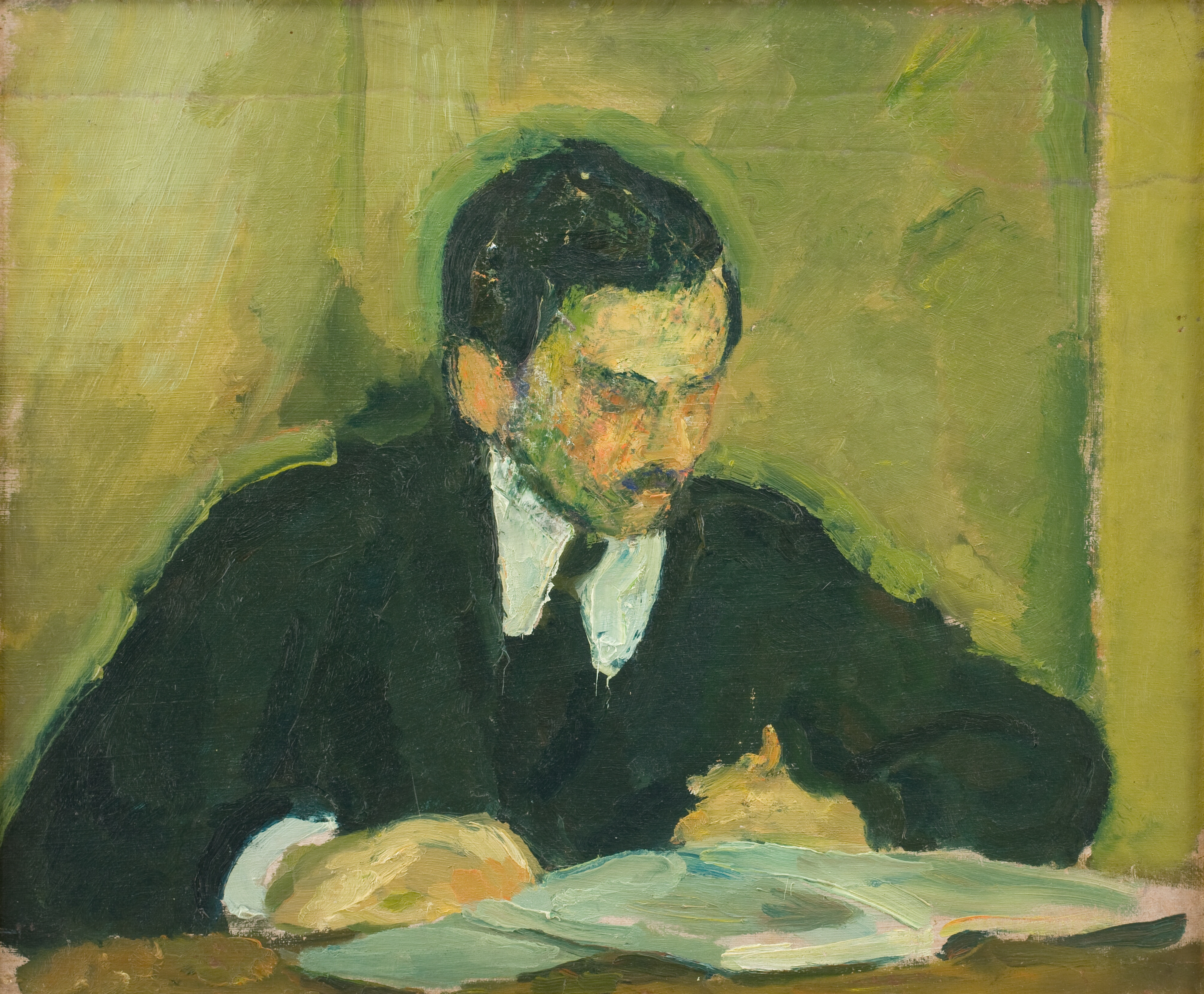 Harald Giersing (1881-1927), Maleren Ernst Goldschmidt laesende, 1915